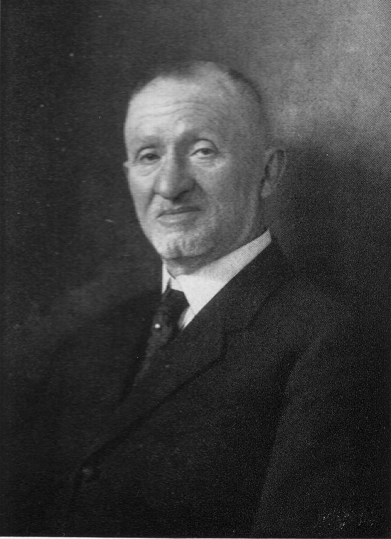 Chaim Eitingon, ‘fur king’(1857-1932)